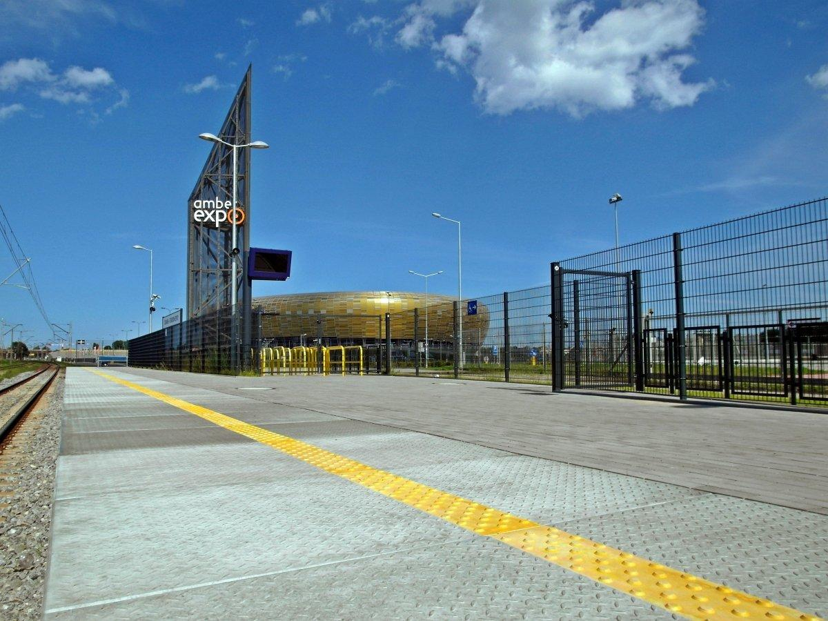 Przystanek dla kibiców, ewentualnie dla odwiedzających Amber EXPO. Jak widać, oprócz imprez zamknięty na głucho :(